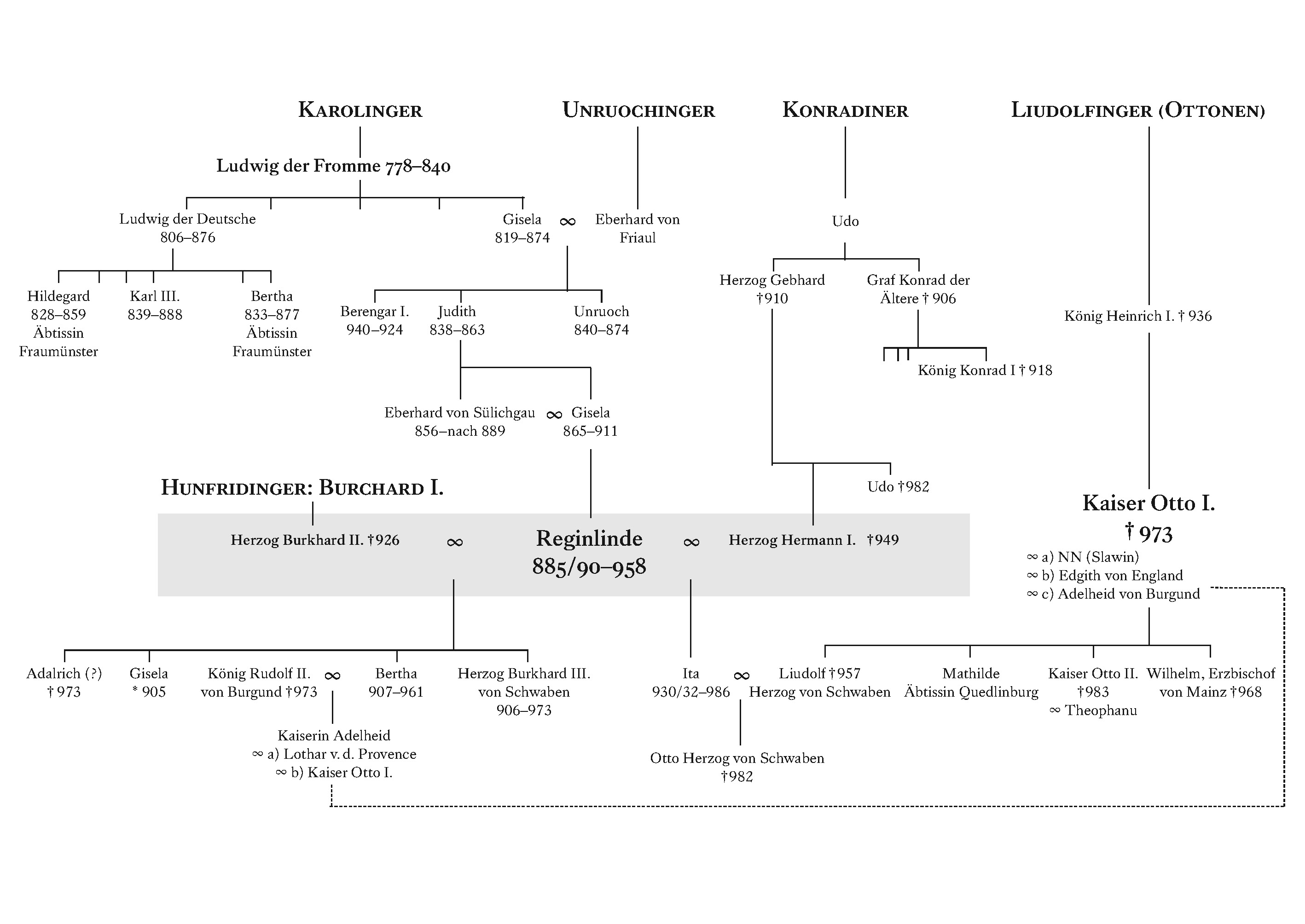 Ahnentafel Reginlinde